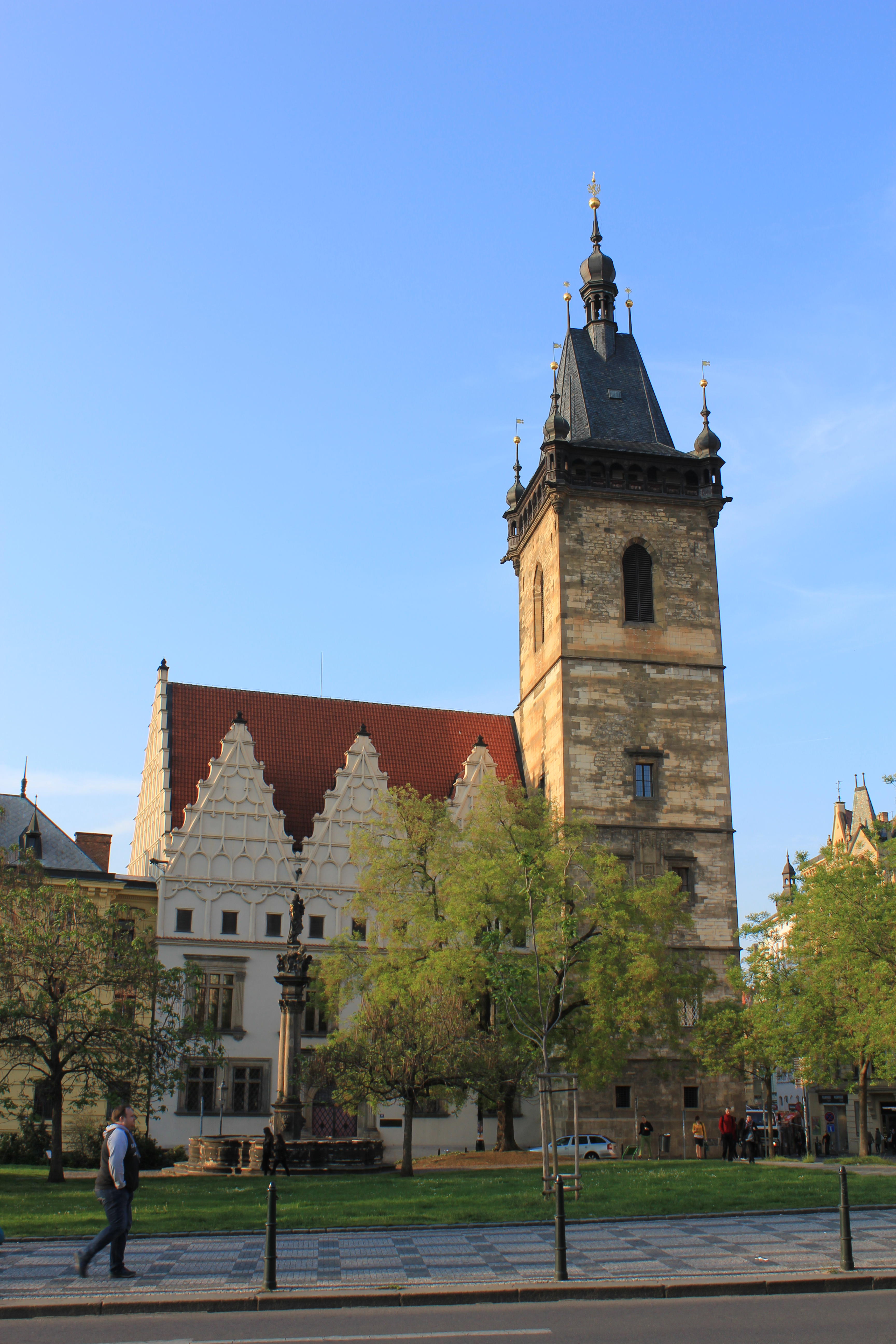 Det nye rådhuset - Navomestska Radnice - The New Town Hall - Nove Mesto - First defenestration